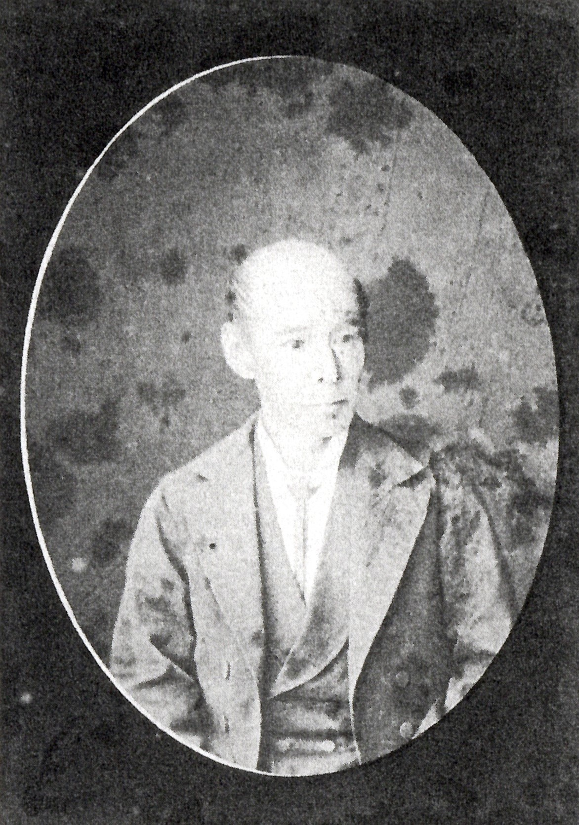 三宅康保の肖像写真。